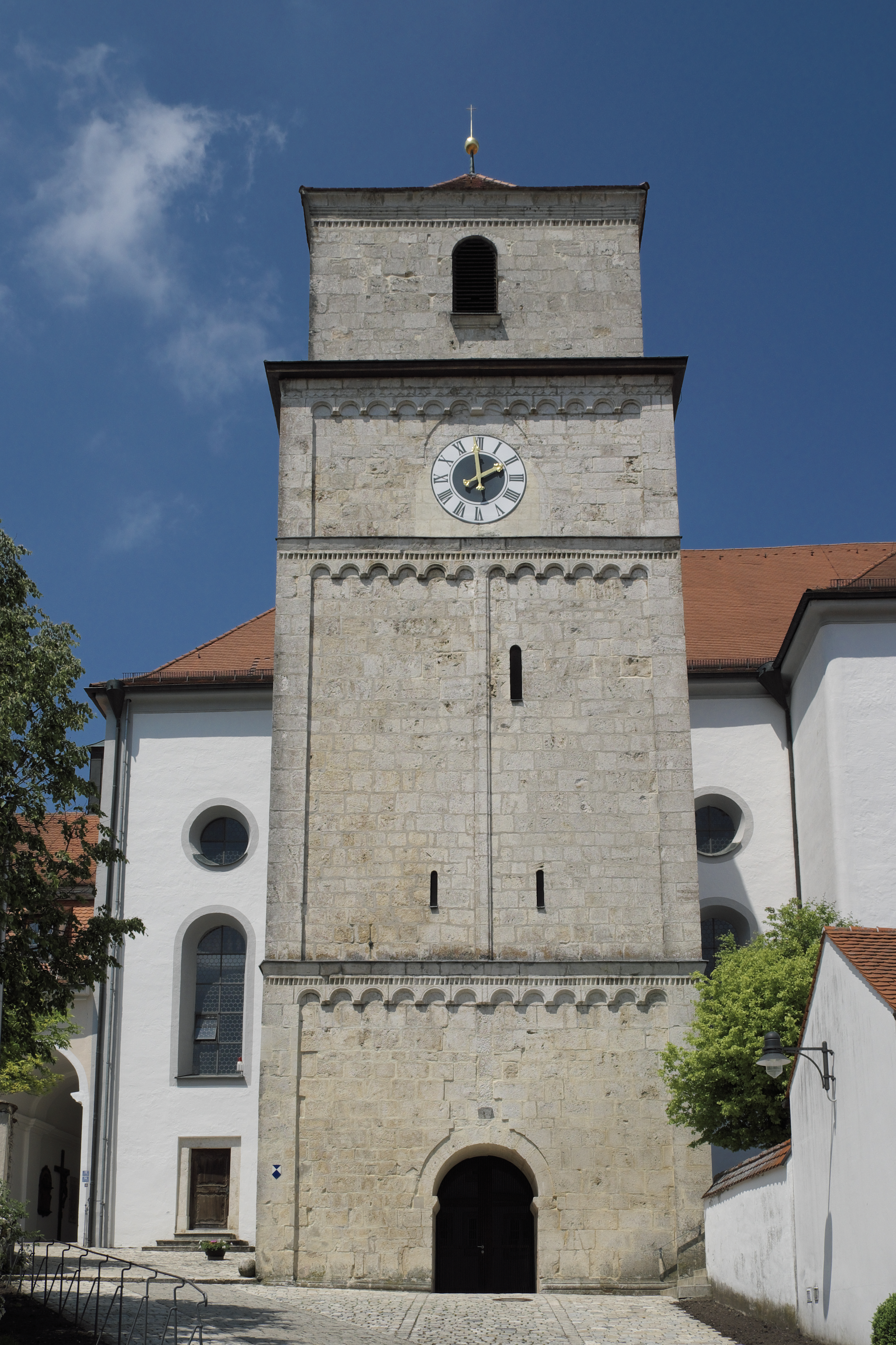 Wallfahrtskirche Heilig Kreuz, ehemalige Klosterkirche des Klosters Bergen in Bergen, einem Ortsteil von Neuburg an der Donau im Landkreis Neuburg-Schrobenhausen (Bayern), romanischer Glockenturm